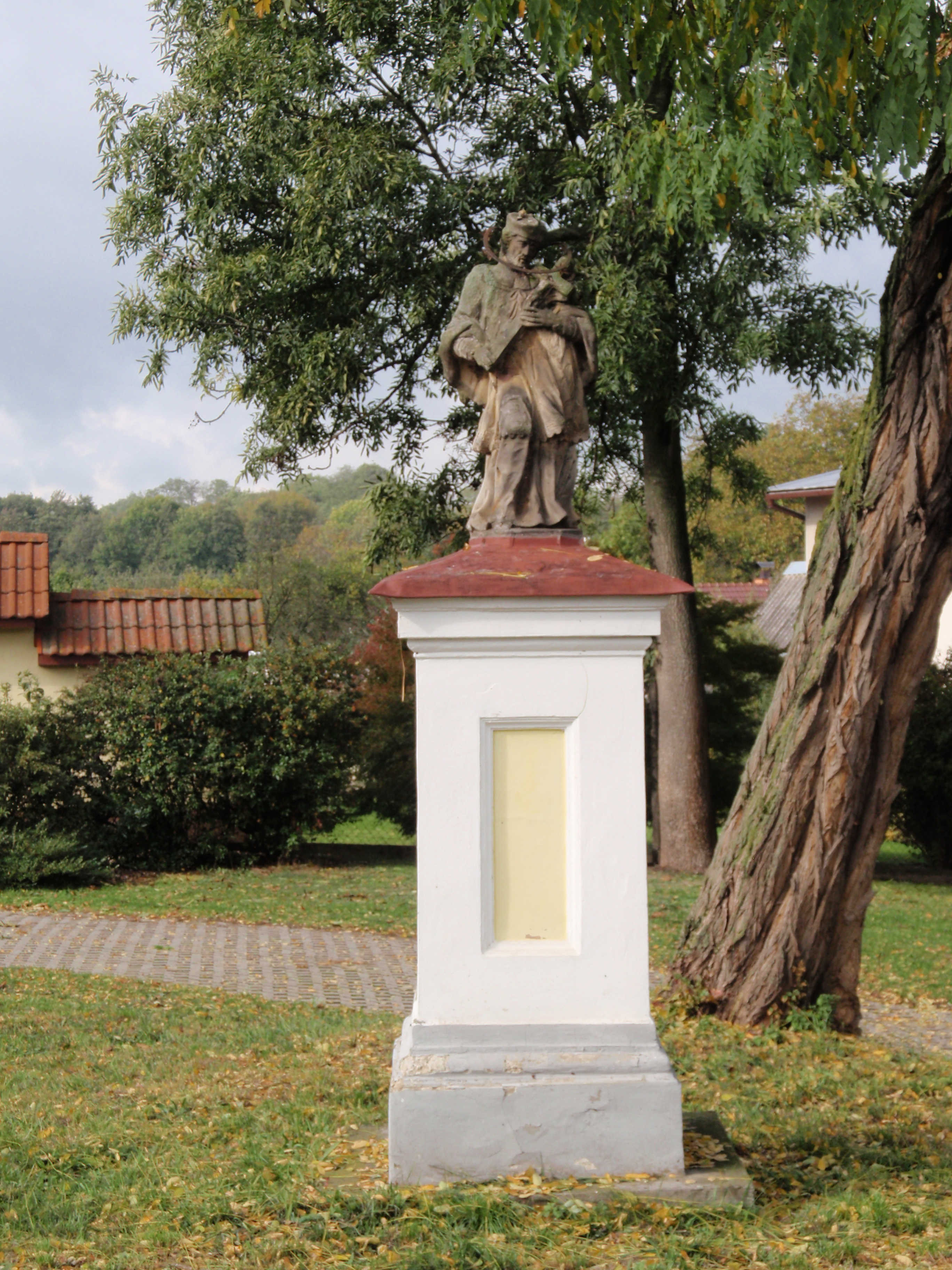 Dědice, Padouchy, Kopřivova, svatý Jan Nepomucký